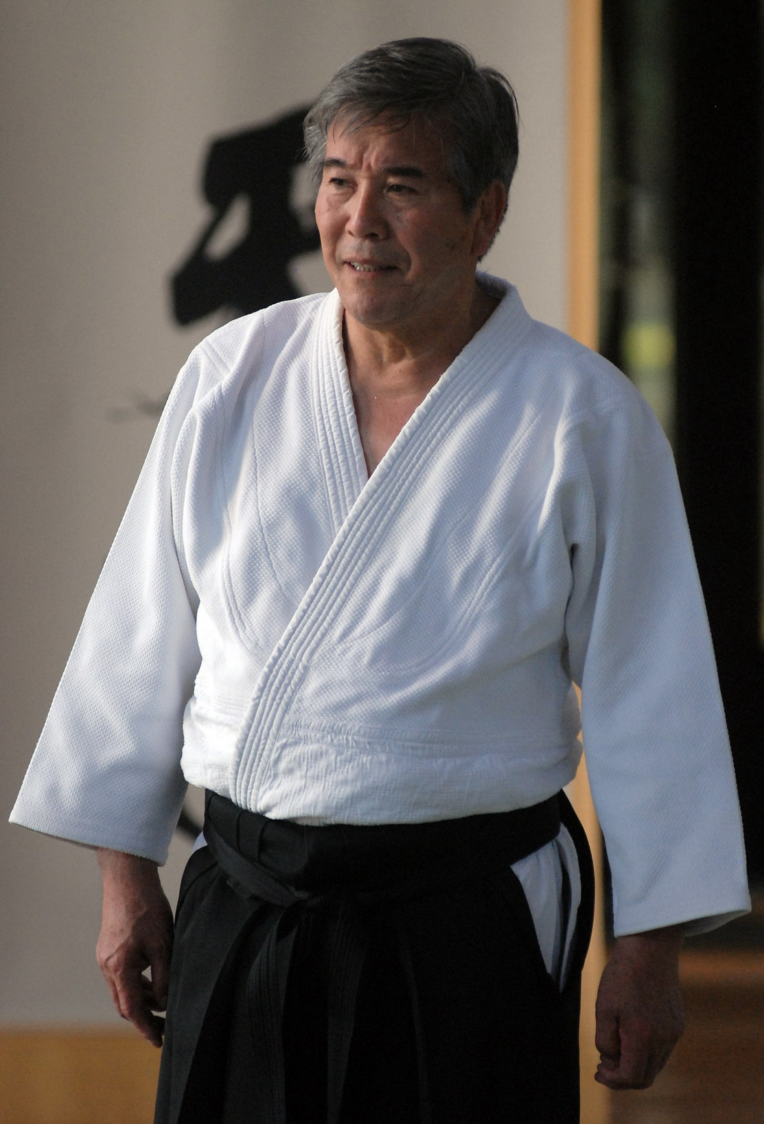 Fotografija sa seminara u Novom Sadu (Srbija) 2007. Licensing